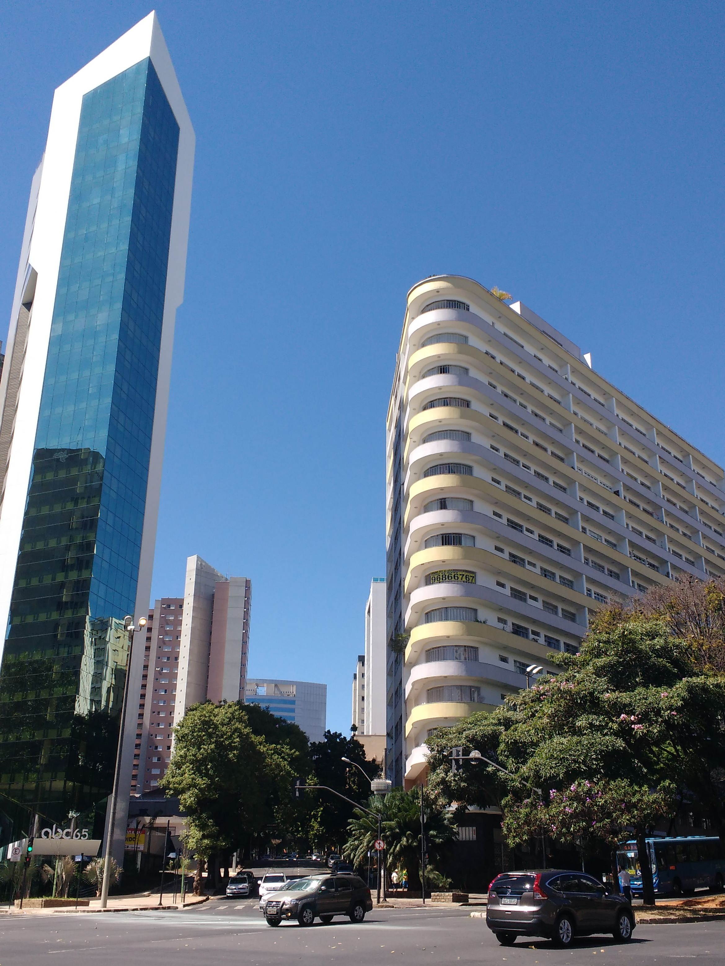 Praça ABC